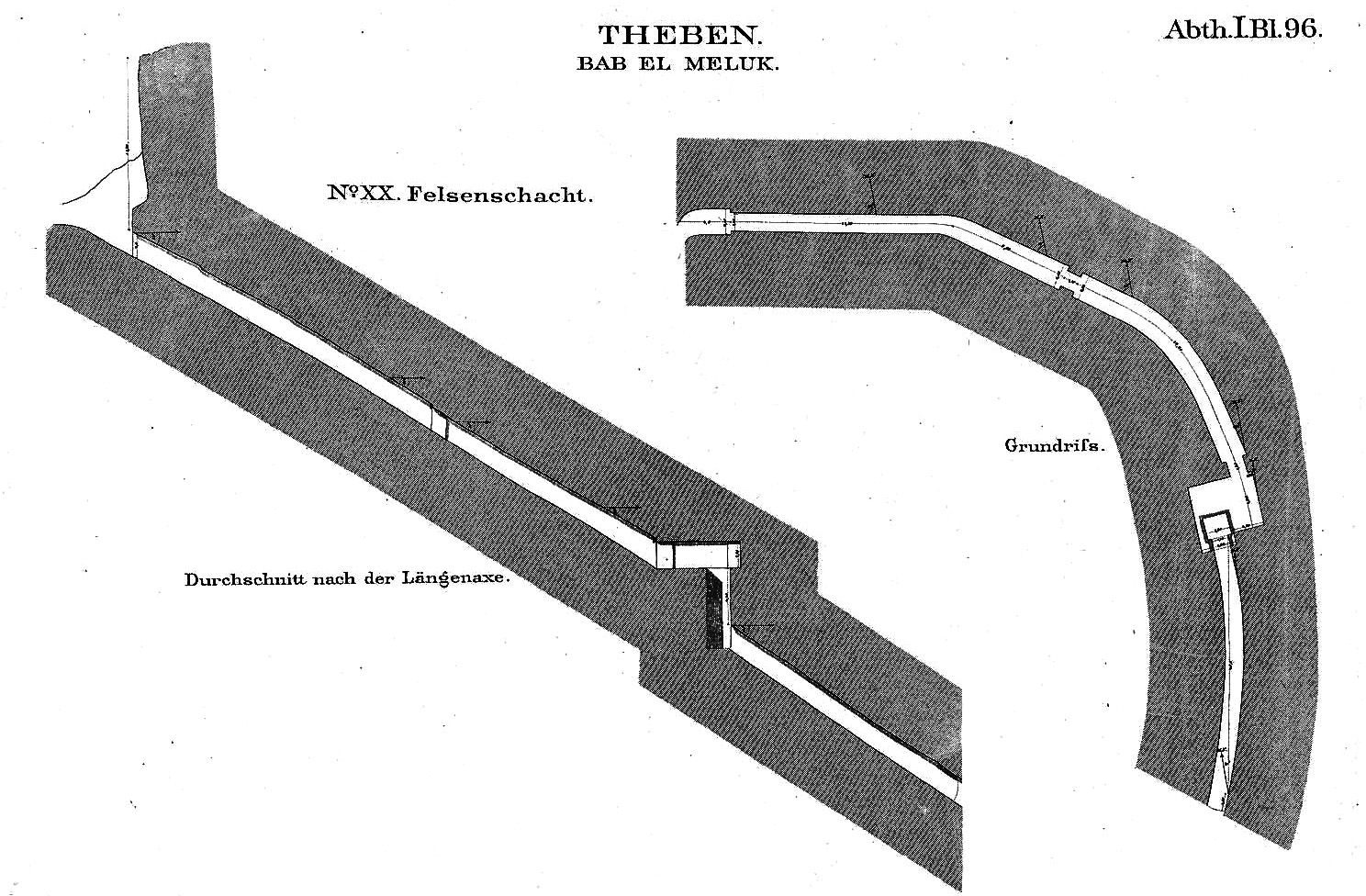 Imatge retocada del dibuix de Lepsius. Només la part superior de la pàgina.